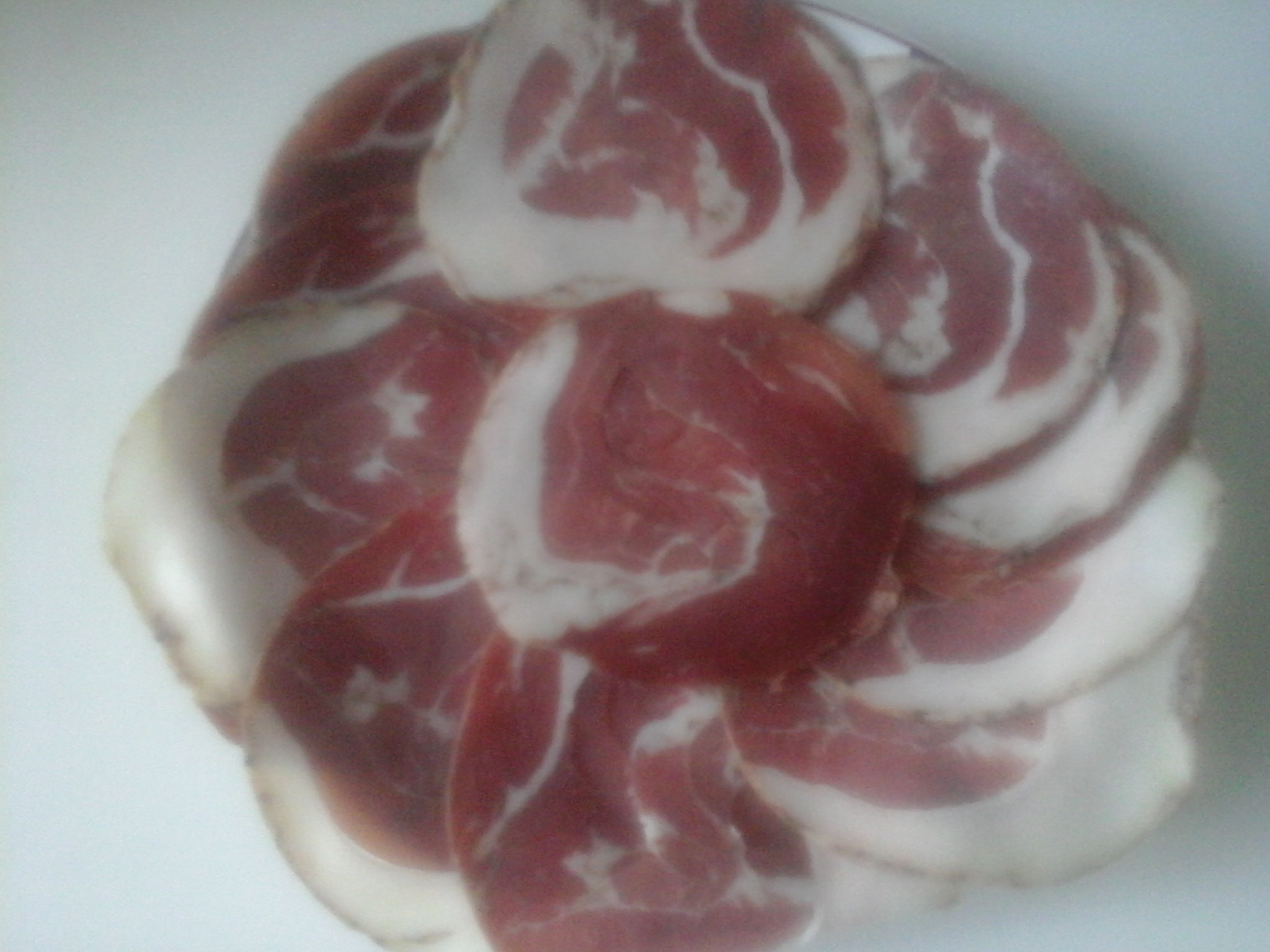 Plat de pancetta.